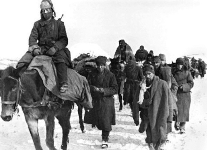 La colonna degli alpini, finalmente fuori dalla sacca, dopo la strepitosa battaglia di Nikolajewka